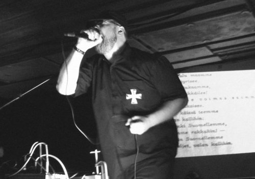 Mikko Aspa vocalista de Clandestine Blaze